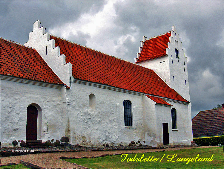 fra nordøst